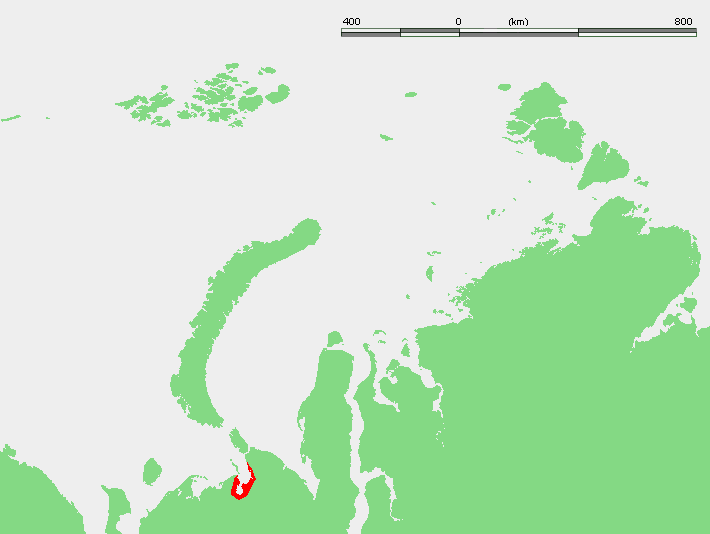 Khaypudyr Bay